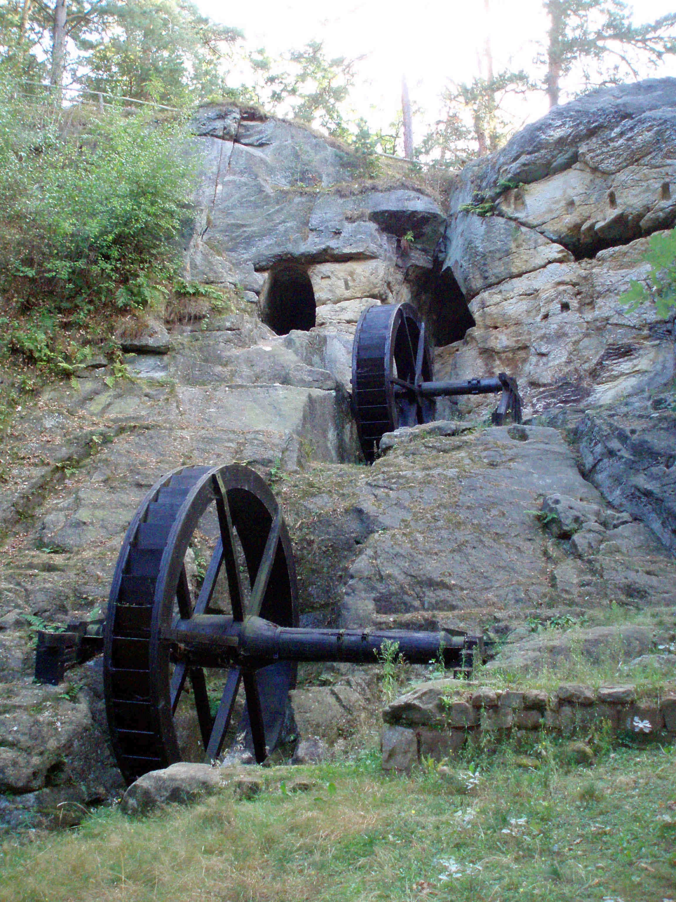 Regensteinmühle